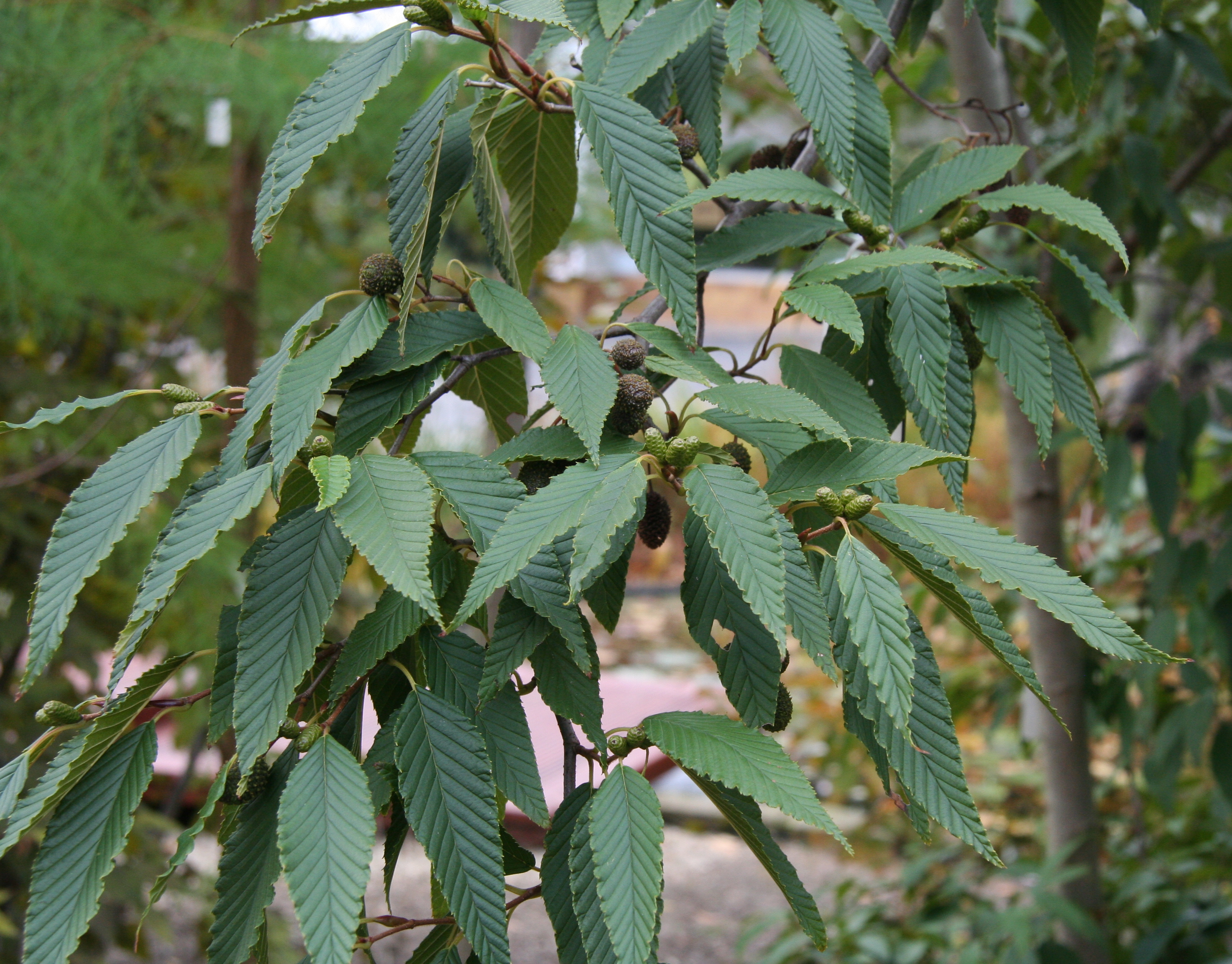 Alnus firma im Botanischen Garten Dresden